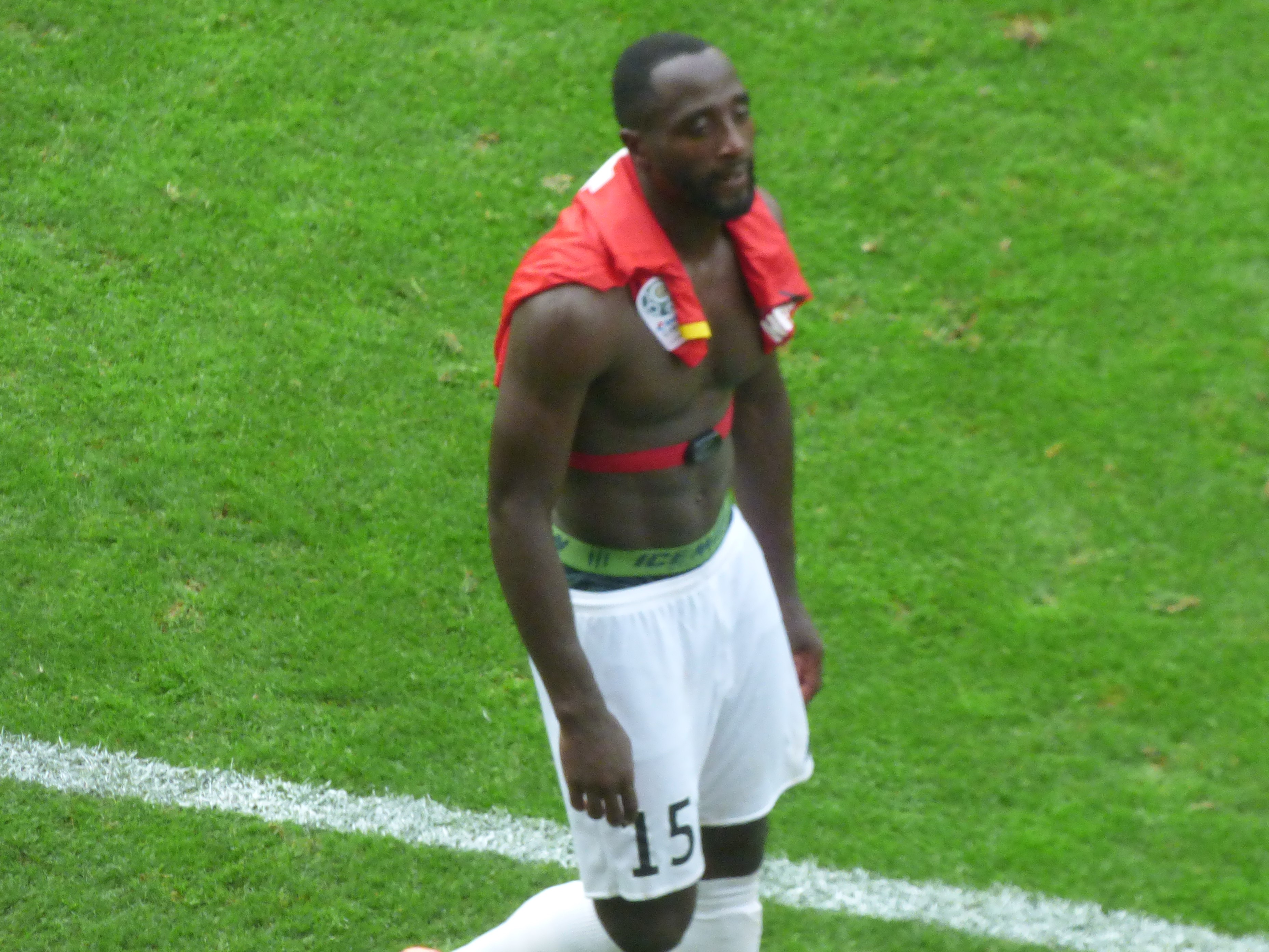 Edson Seidou après le match RC Lens / Red Star, comptant pour la deuxième journée du championnat de France de Ligue 2 2018-2019 au Stade Bollaert-Delelis, le 4 août 2018.